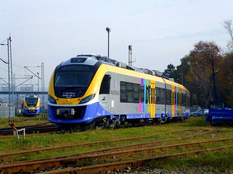 Elektryczny zespół trakcyjny EN79-002 wyprodukowany przez Newag dla Kolei Małopolskich stoi na terenie zakładu producenta w Nowym Sączu.